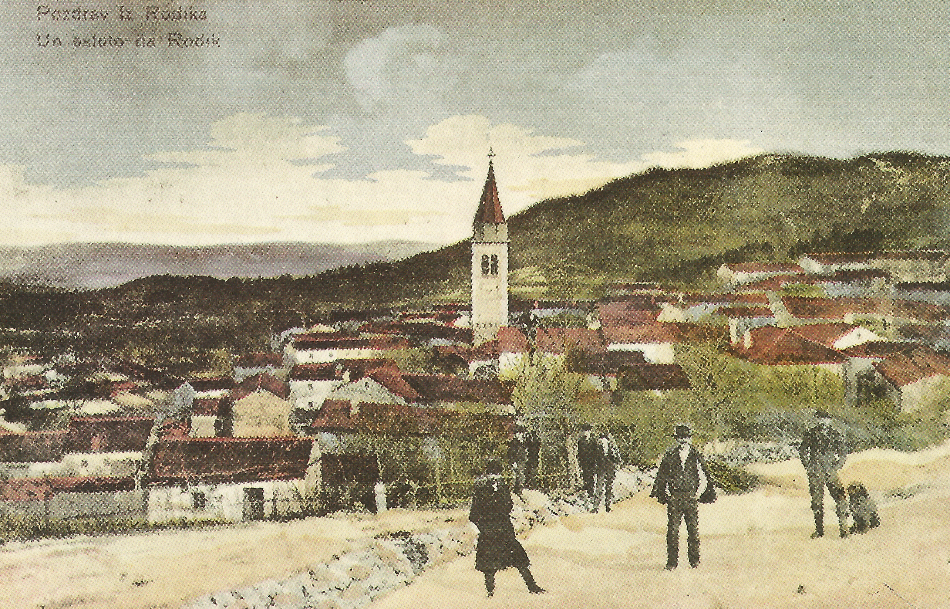 Razglednica Rodika.